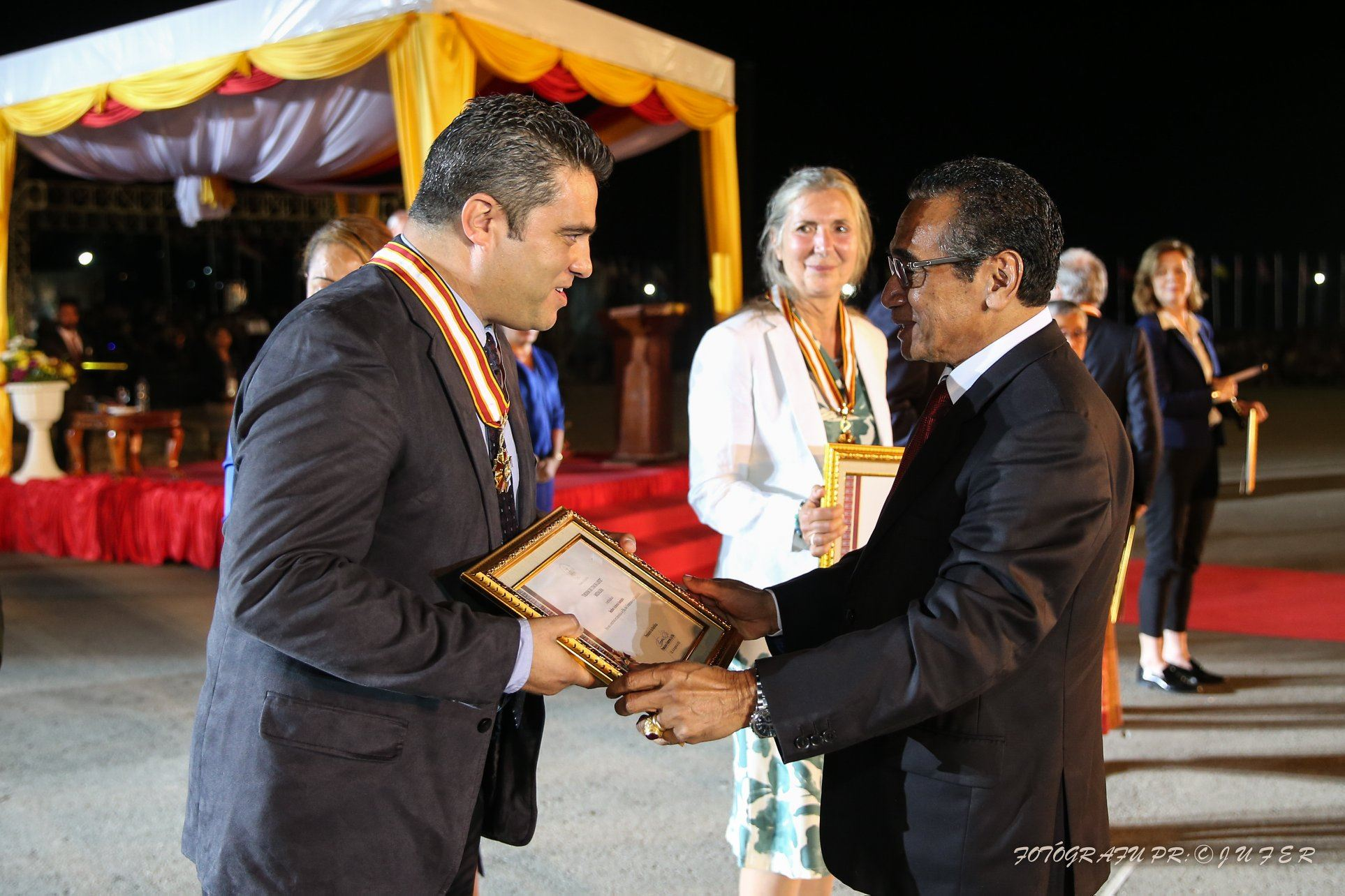 António Sampaio bekommt den Ordem de Timor-Leste von Francisco Guterres bei den Feierlichkeiten zum zwanzigsten Jubiläum des Unabhängigkeitsreferendums. Irena Cristalis im Hintergrund.